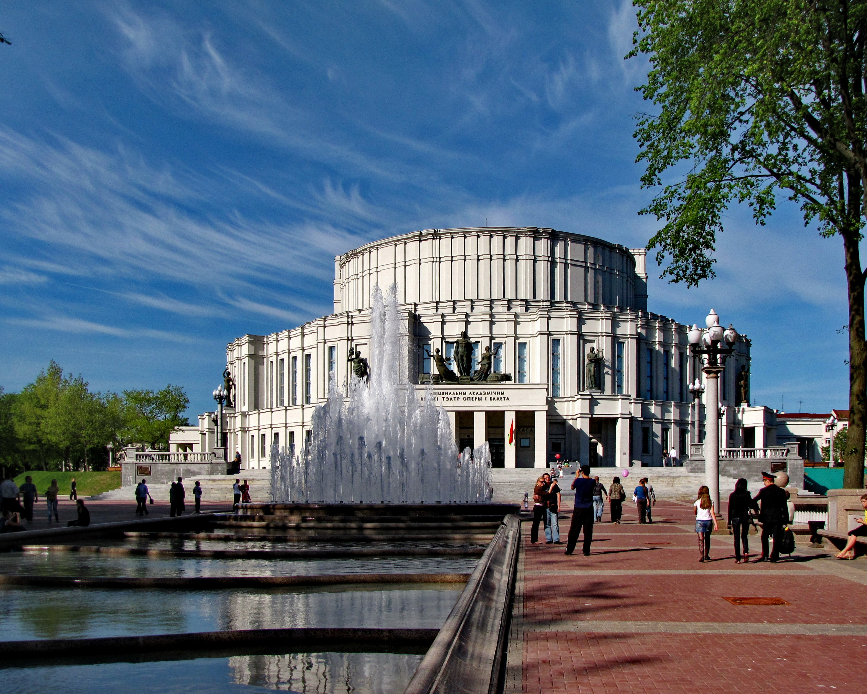 Беларуская (тарашкевіца): Будынак Нацыянальнага акадэмічнага Вялікага тэатра оперы і балета Рэспублікі Беларусь. г. Менск